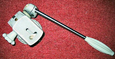 Linhof-Panoramakopf, ein Stativkopf